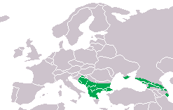 Distribution of Triturus karelinii, based on Nöllert/Nöllert: "Die Amphibien Europas" Distribution in Caucasus based on С.Л. Кузьмин "Земноводные бывшего СССР" Москва: Товарищество научных изданий КМК. 1999, стр. 280